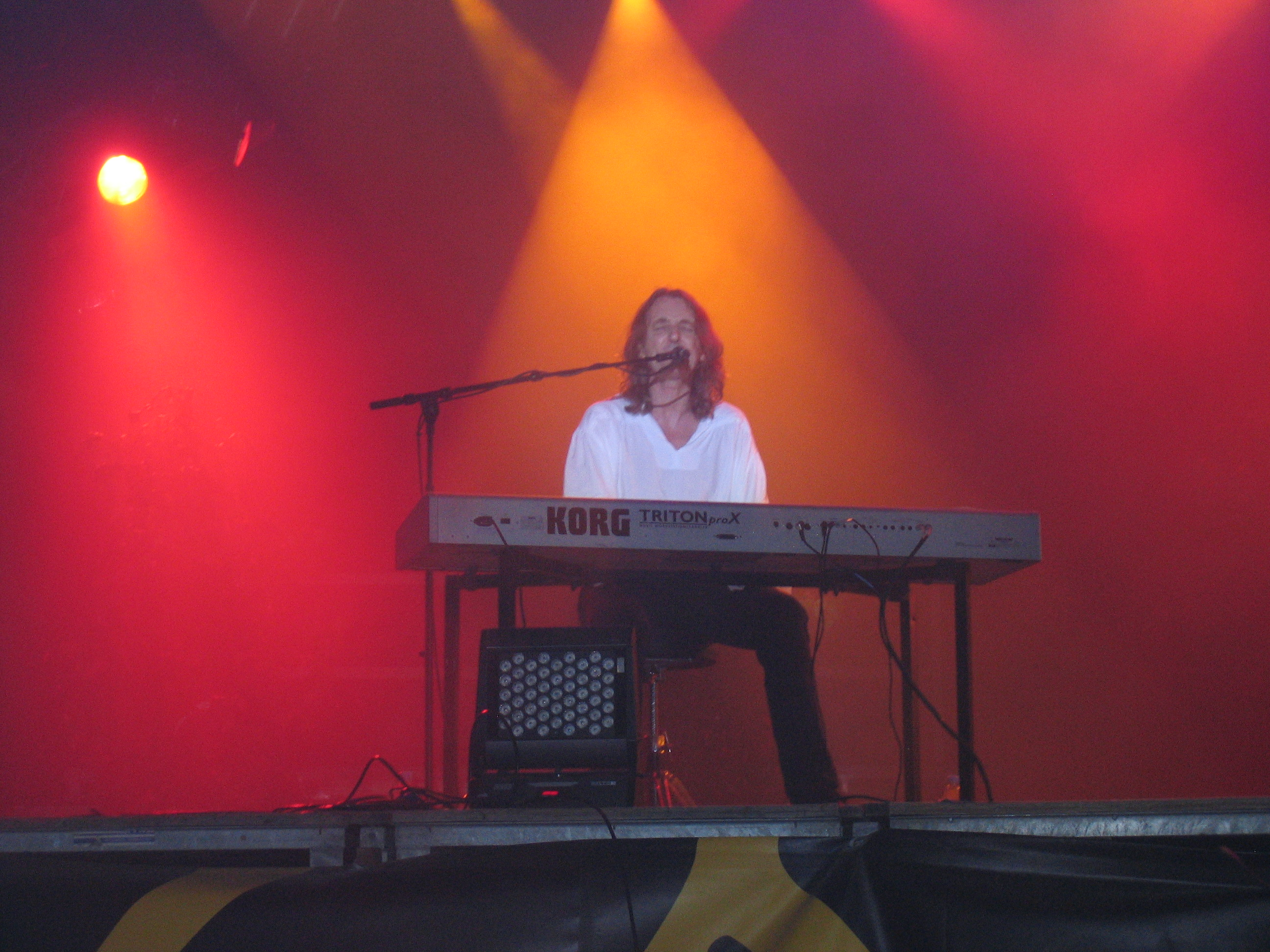 Roger Hodgson performing at Langelandsfestivalen 2006. Picture taken by User:Lhademmor